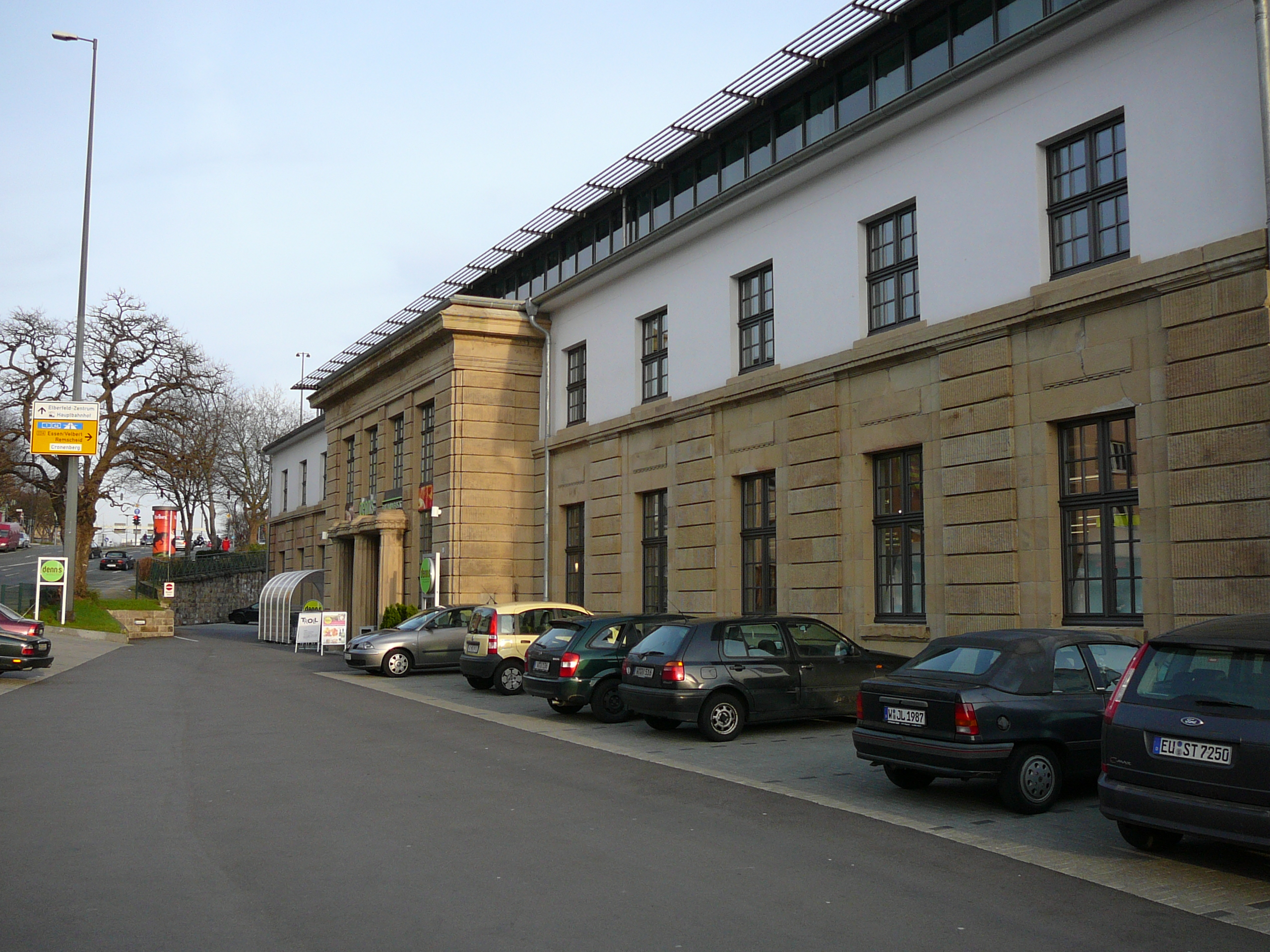 Arrenberg, Wuppertal